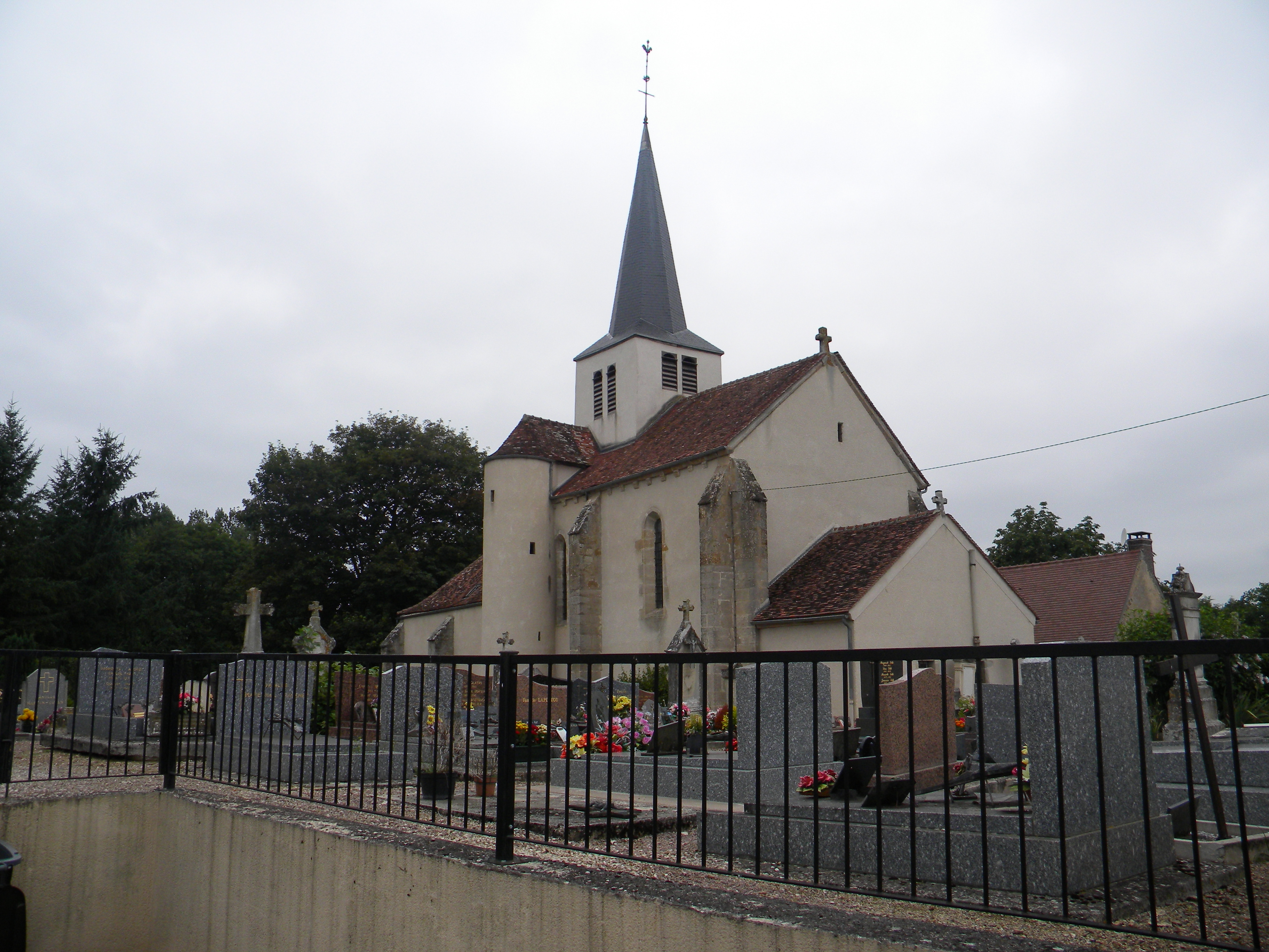 Saint-Euphrône Église Saint-Clément